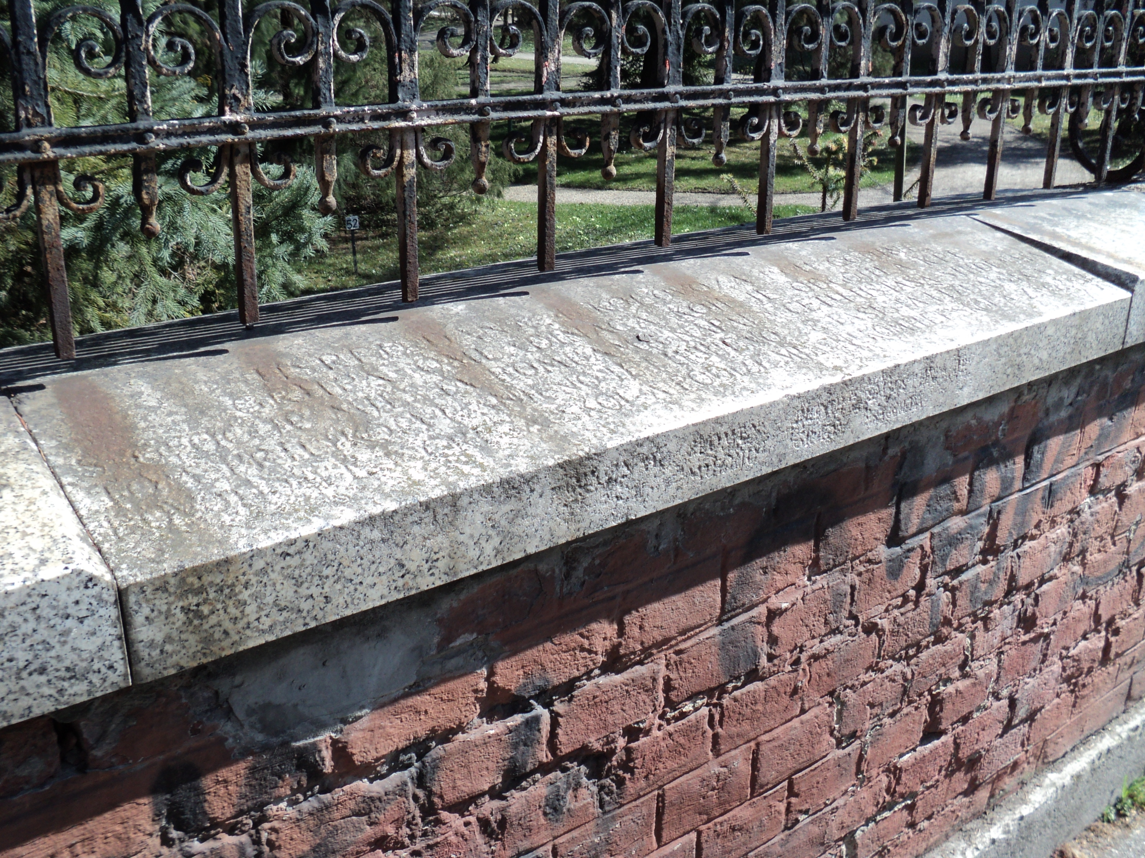 Mjesto kod Botaničkog vrta u Zagrebu, gdje su diverzanti predvođeni Slavkom Komarom izvršili napad bombama na 28 ustaša u avgustu 1941. godine.